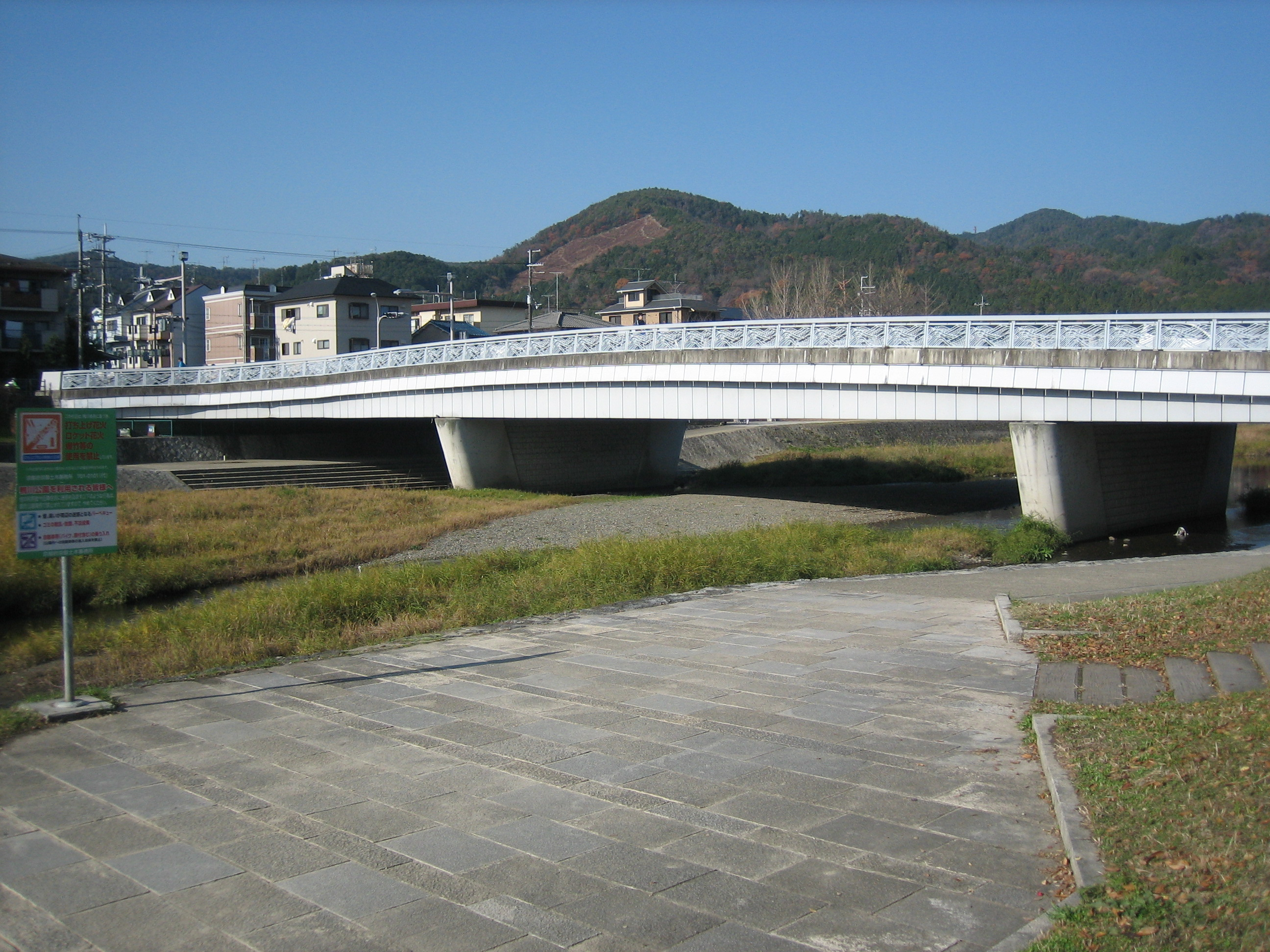 西賀茂橋を橋東詰河川敷から撮影